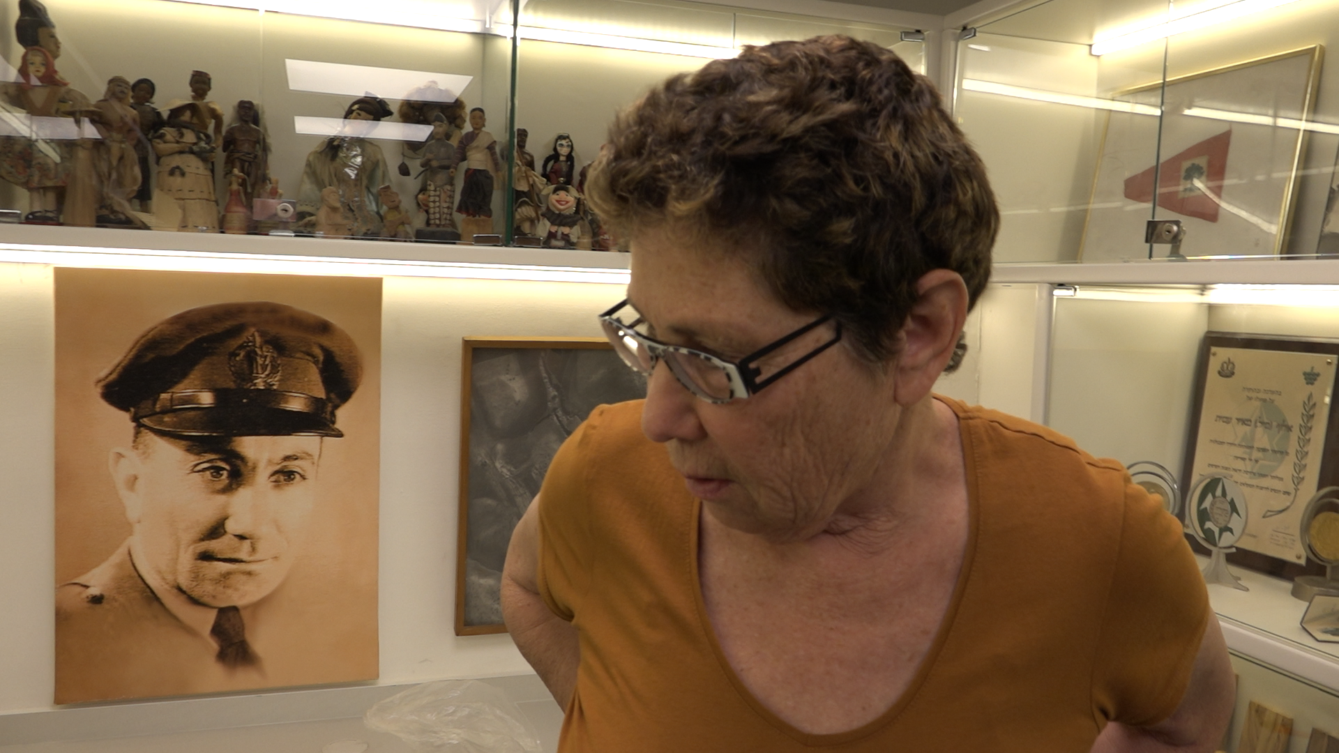 ענת גונן לצד תמונת אביה זכרונו לברכה. התמונה פורסמה בהזמנה להקרנת הסרט בקרון הספרים בקריית טבעון.